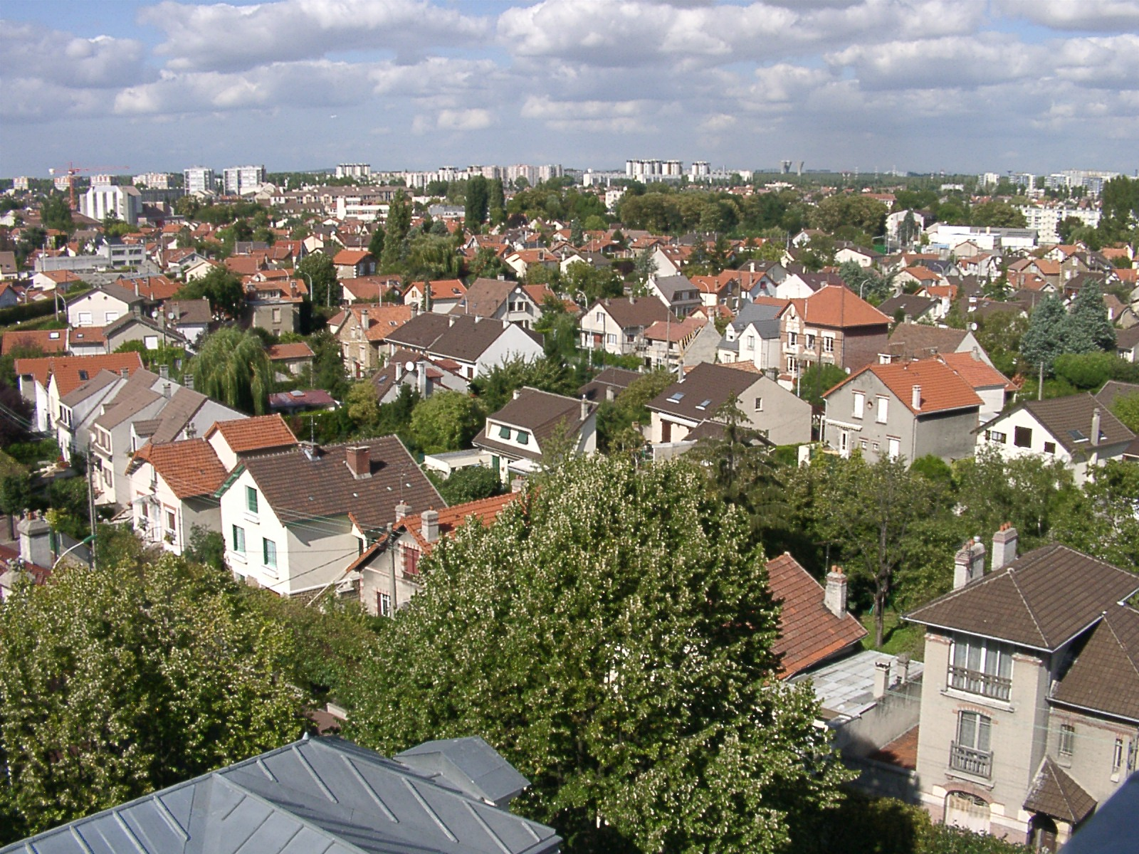 Vue prise par Hervé SUAUDEAU (utilisateur:Suaudeau) du clocher de la mairie d'Aulnay-sous-Bois. Vue en direction du Nord, avec les grands ensembles au fond et les zonnes pavillonaires devant (19-09-2004). Licensing Catégorie:Image de Aulnay-sous-Bois